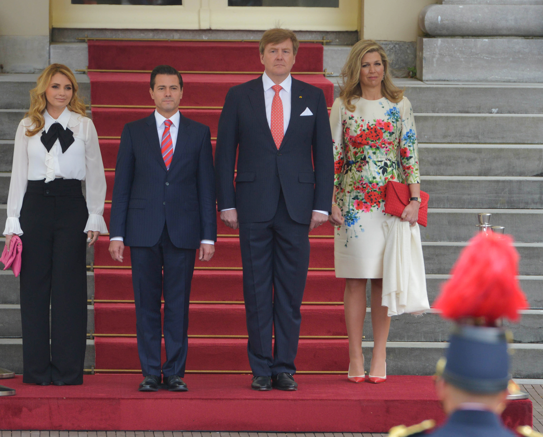 Visita oficial del Presidente de la República Mexicana al reino de los Países Bajos.